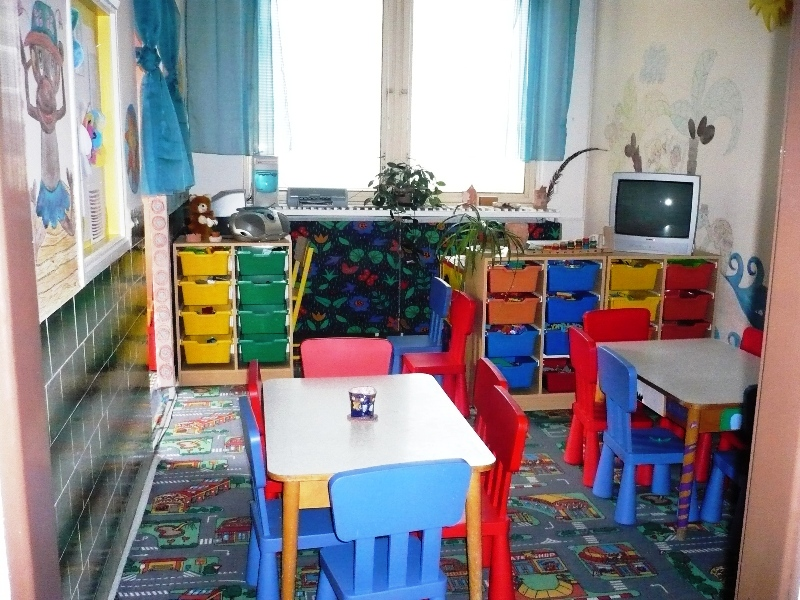 Družina